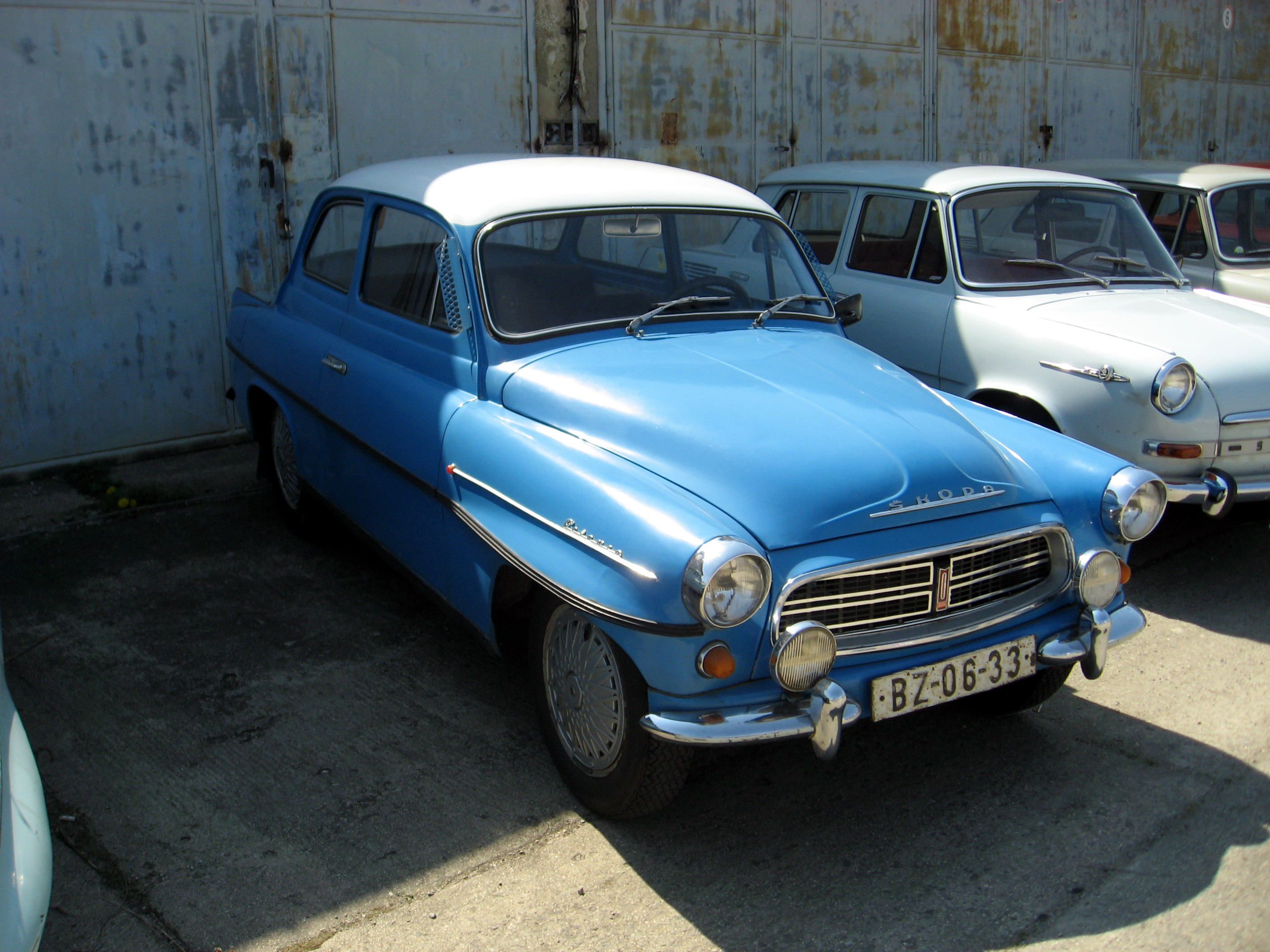 Škoda Octavia